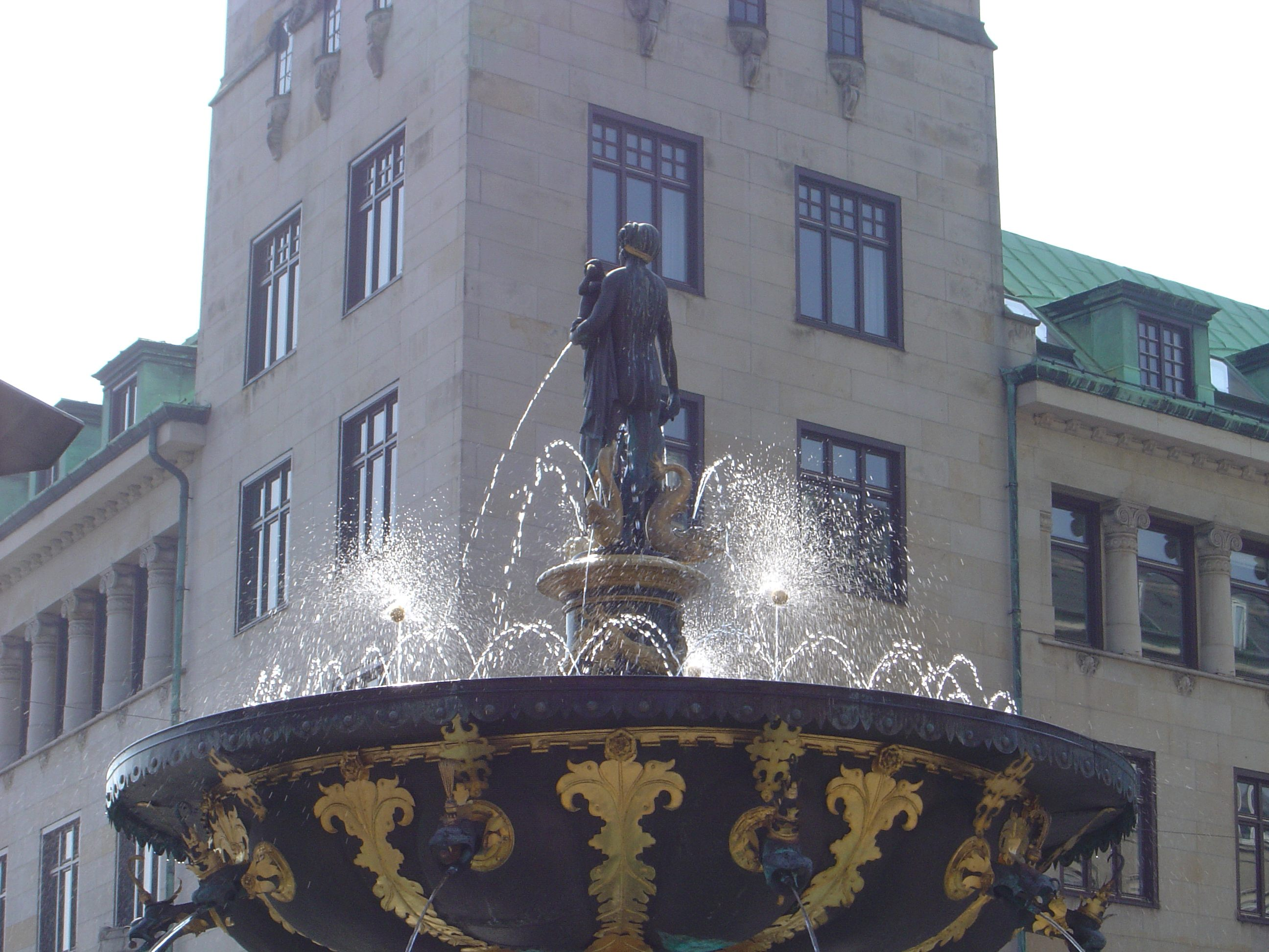 Guldæbler i Caritas brønden på Gammeltorv i København.